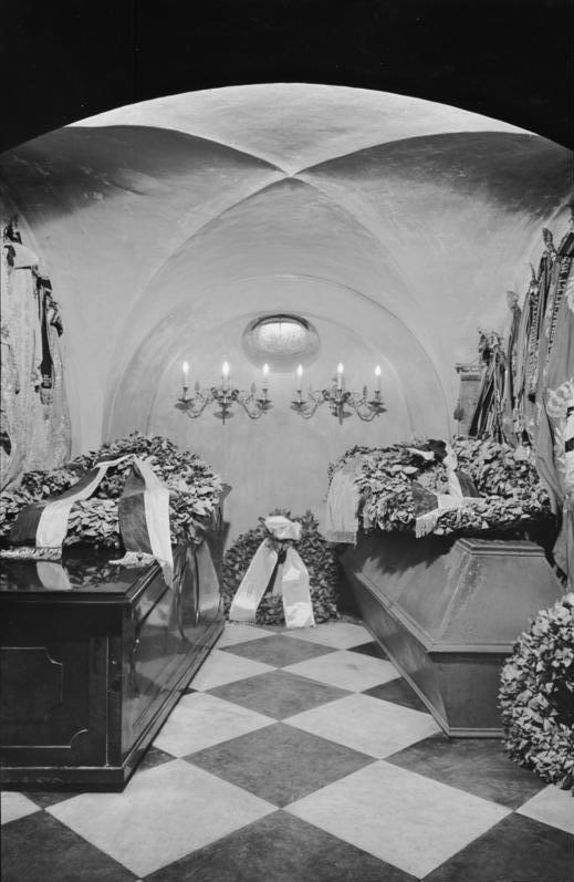 Potsdam.- Königsgruft in der Garnisonkirche